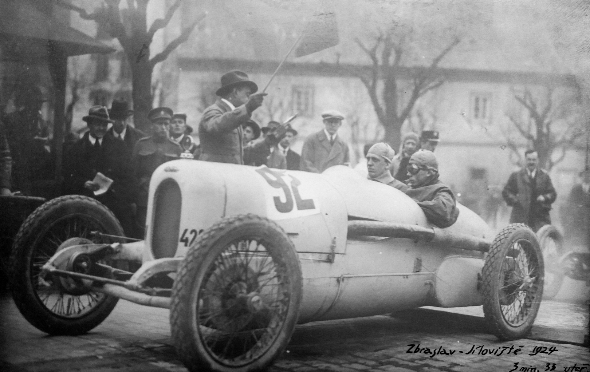 Walter 0 závodní, Knapp-Vojíř, závod do vrchu Zbraslav-Jíloviště (1924), Jindřich Knapp obsadil 3. místo v kategorii závodních vozů i ve třídě do 2000 cm³, když lepšího času než 3:33,6 min. dosáhly jen dva závodní, tovární Mercedesy s kompresorem. Vytvořil rekord závodu na československém automobilu. Knapp získal Cenu Ministerstva obrany určenou nejrychlejšímu vozu čs. výroby.